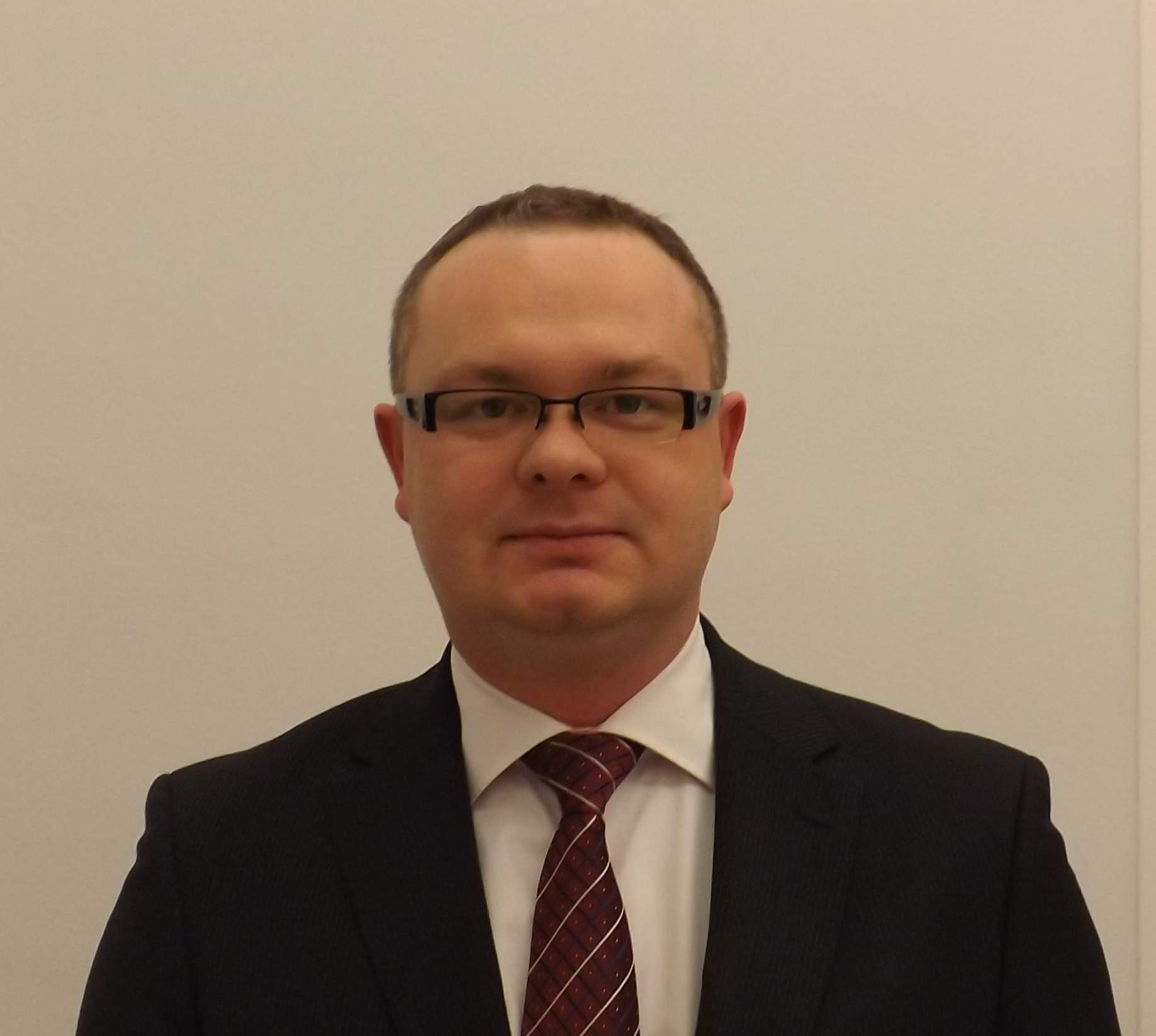 Krzysztof Kłosowski, poseł Twojego Ruchu.